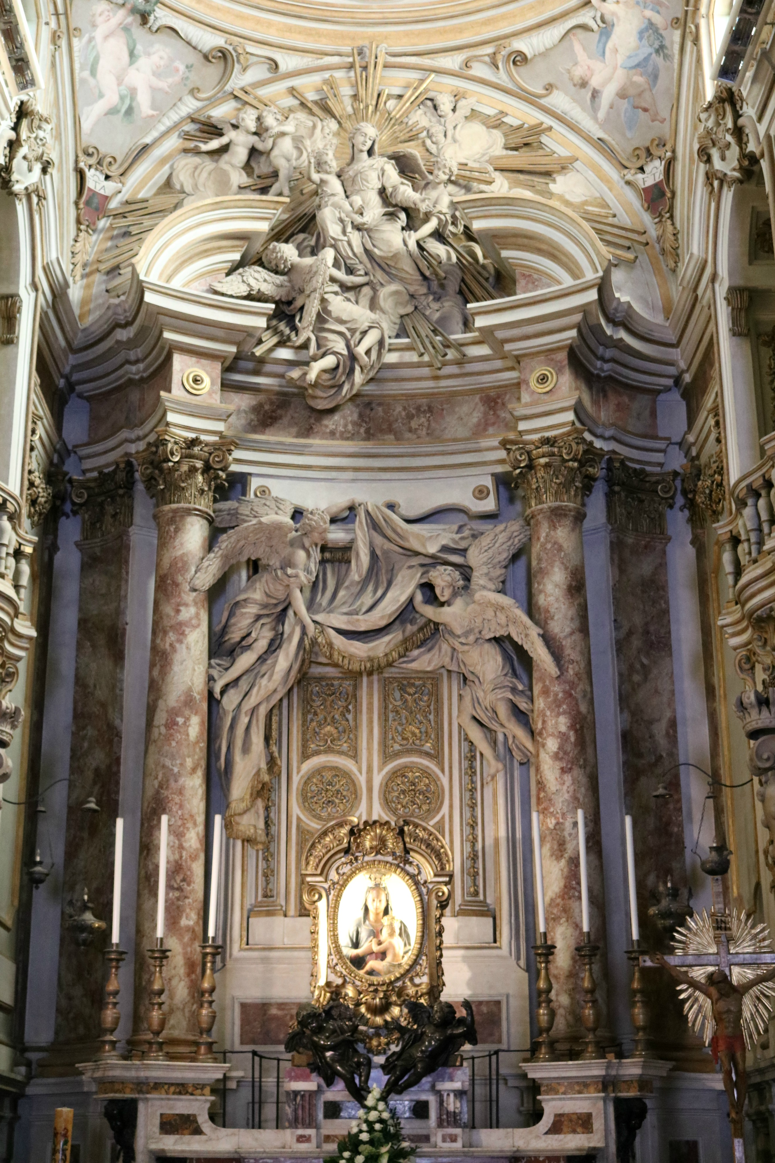 Collegiata di San Lorenzo (Montevarchi)